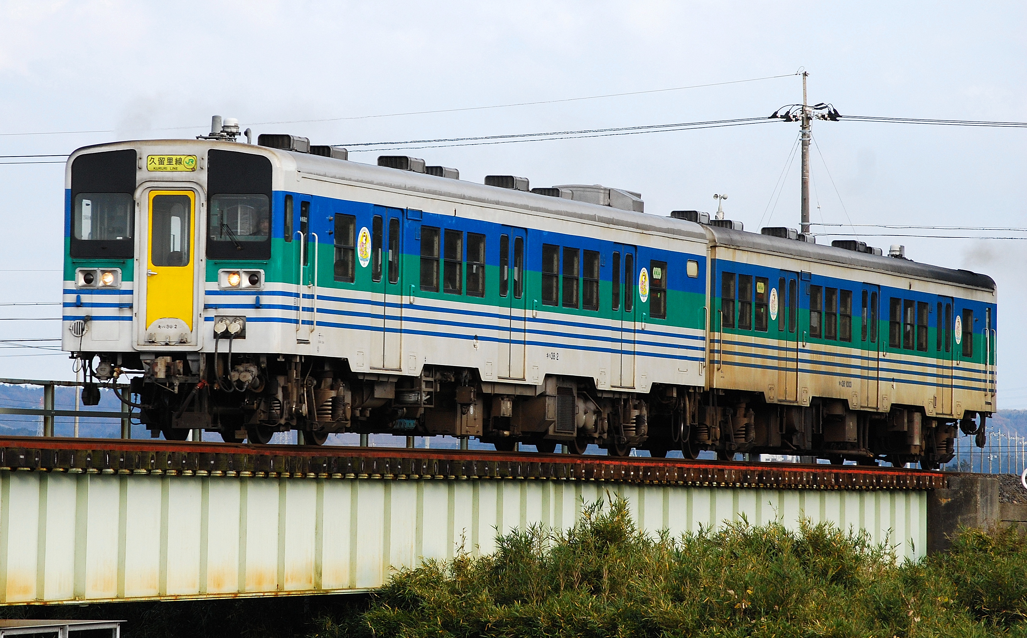 久留里線のキハ38 0・1000番台